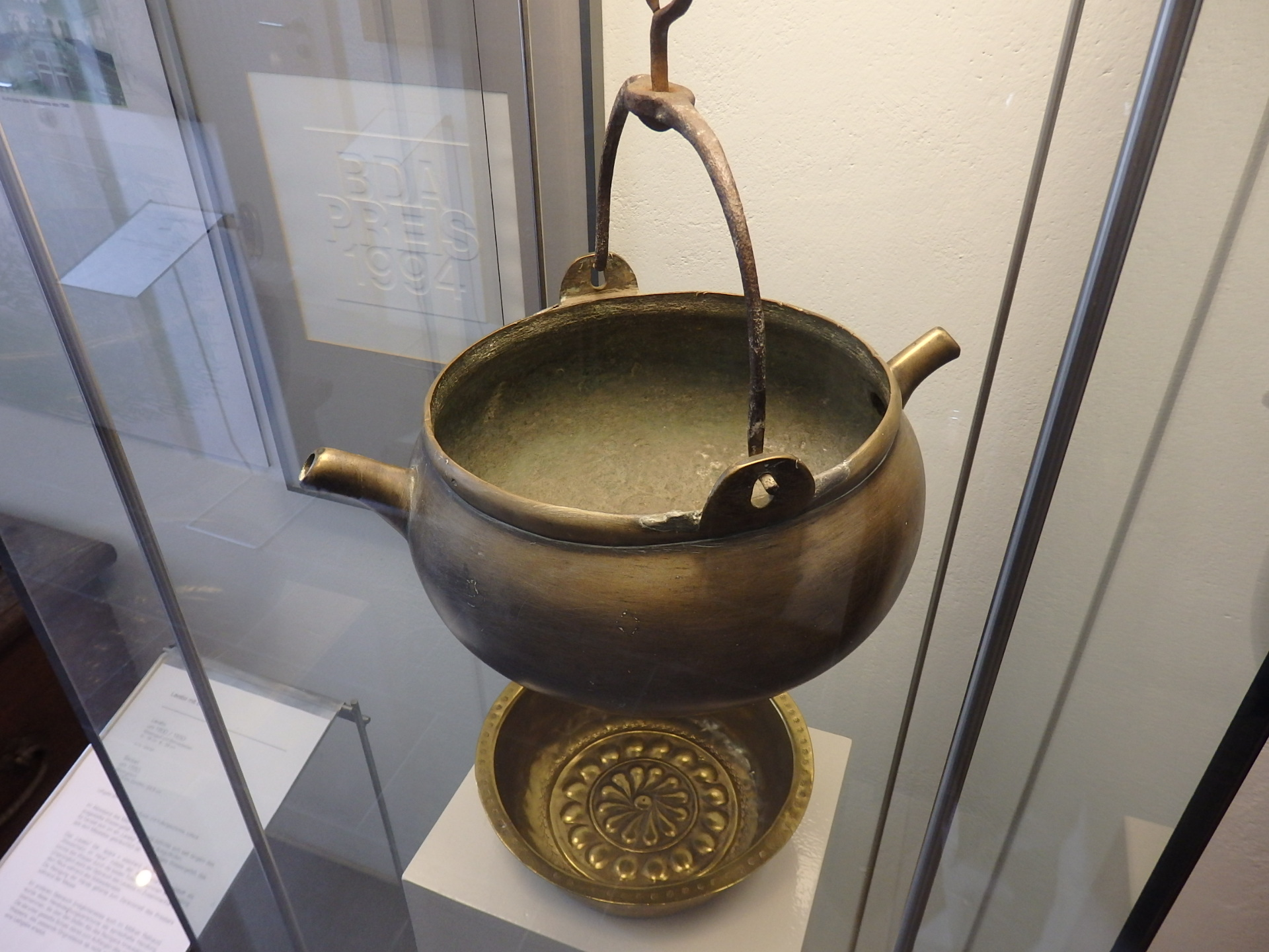 Lavabo mit zwei Ausgüssen aus Messingguß und Schmiedeeisen, ca. 1600 bis 1650, Möllner Museum